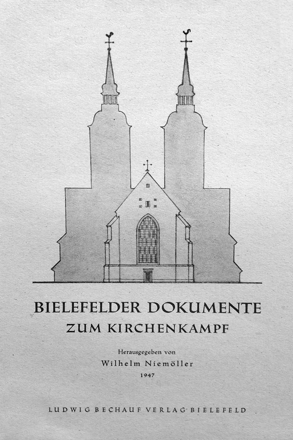 Titelseite einer Veröffentlichung von Wilhelm Niemöller (1947)